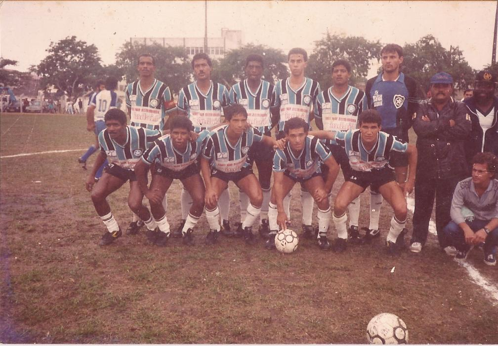 Equipe do União Nacional FC, campeã da terceira divisão do Rio em 1988.